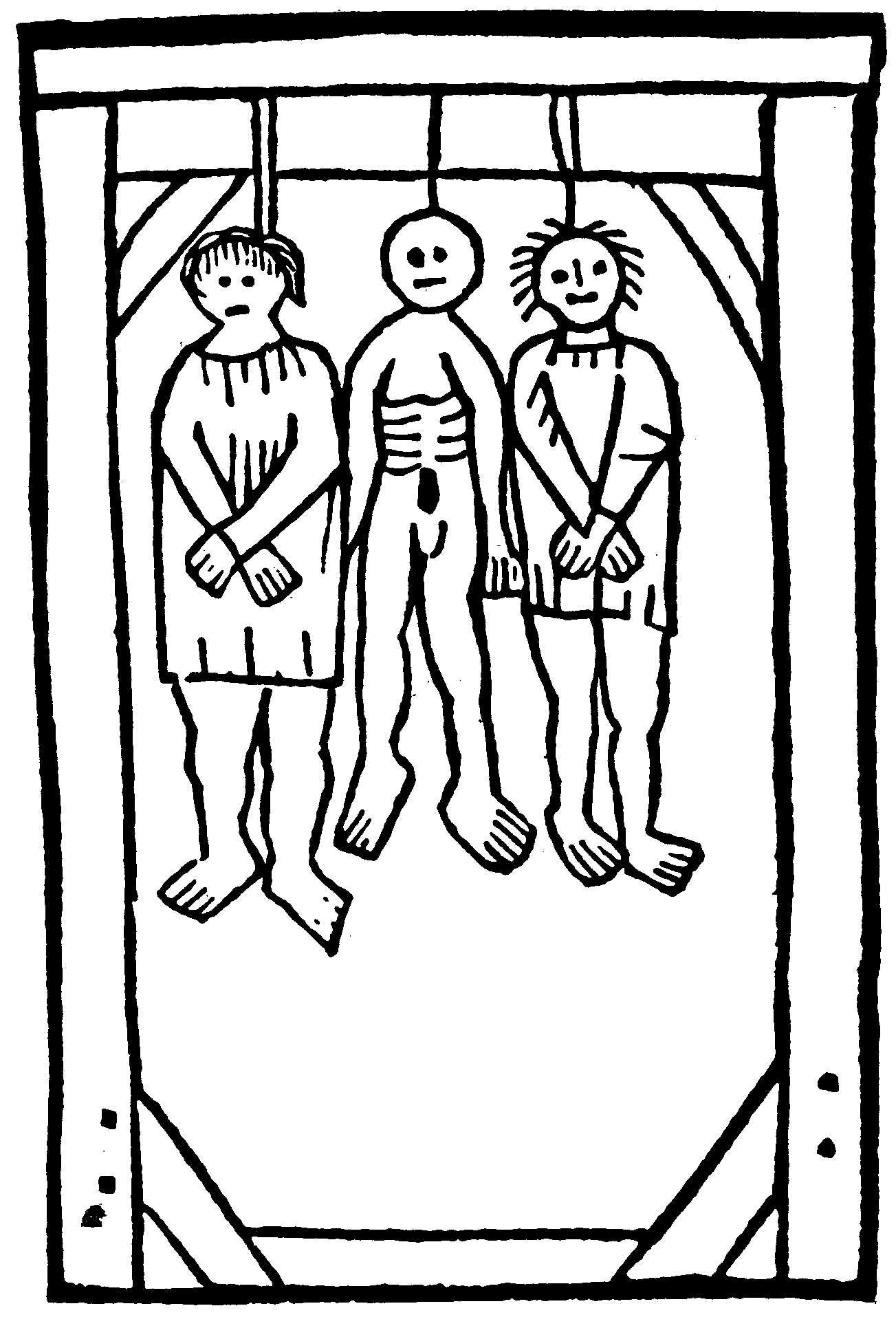 Woodcut Les pendus